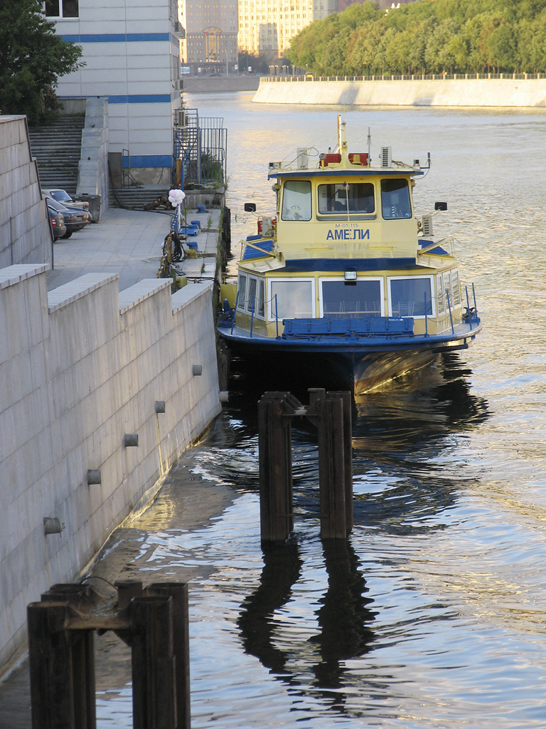 Motorŝipo M-01-115 «Ameli» (Амели) de la tipo «Moskva» en Moskvo.